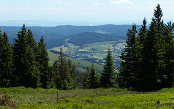 Das Bernauer Hochtal von Norden gesehen.